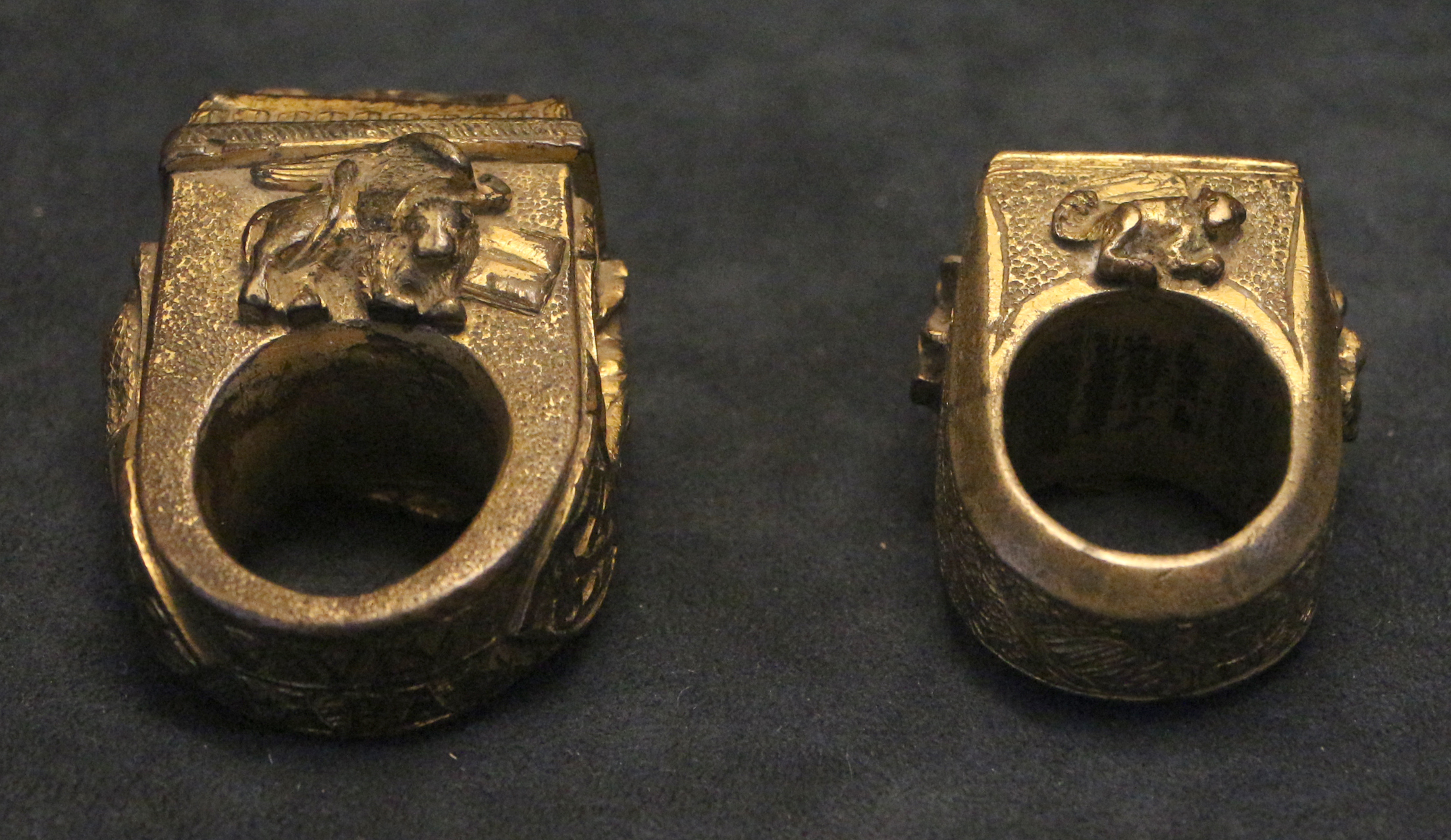 Palazzo Pretorio (Museo Diocesano Tridentino) This is a photo of a monument which is part of cultural heritage of Italy.